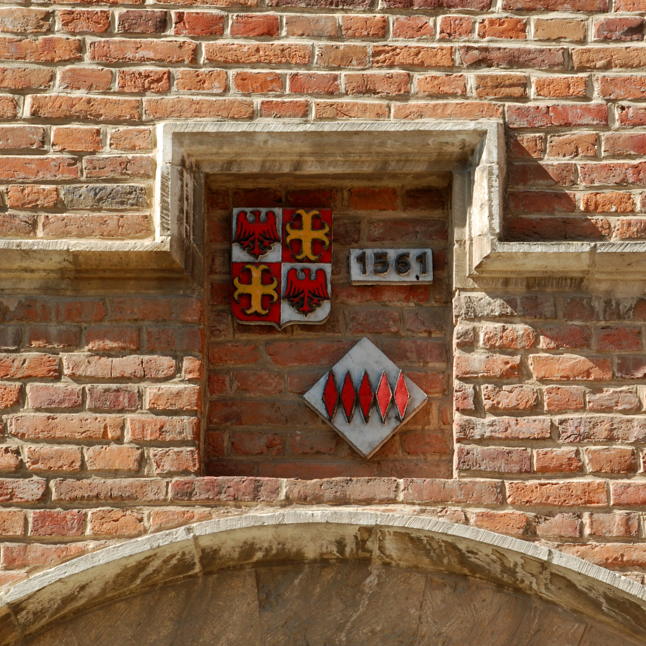 Belgium - Leuven - Groot Begijnhof - Convent van Chièvres - Benedenstraat 39